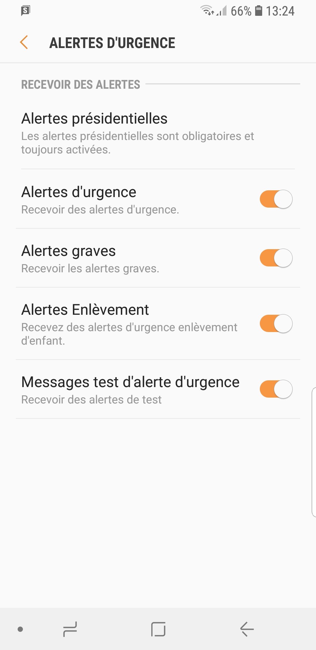 Cell Broadcast example Samsung G8